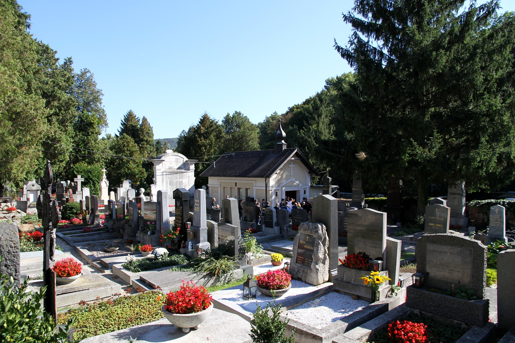 Der Friedhof von Weidling, eine Ortschaft in der niederösterreichischen Stadt Klosterneuburg.